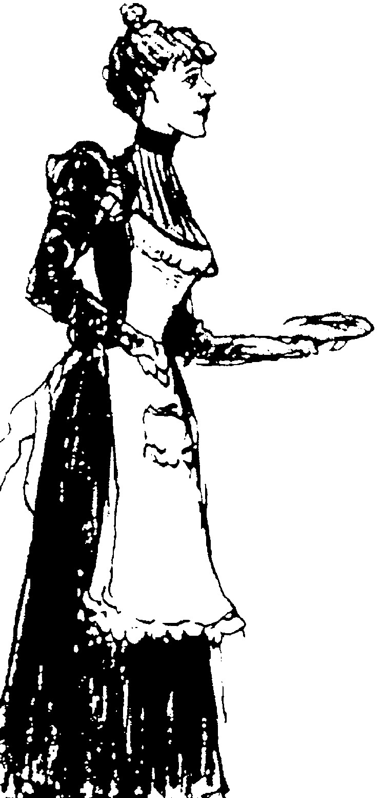 dessin d'Octave Mirbeau (1848-1917), représentant Célestine, l'héroïne de Le Journal d'une femme de chambre, d'Octave Mirbeau)